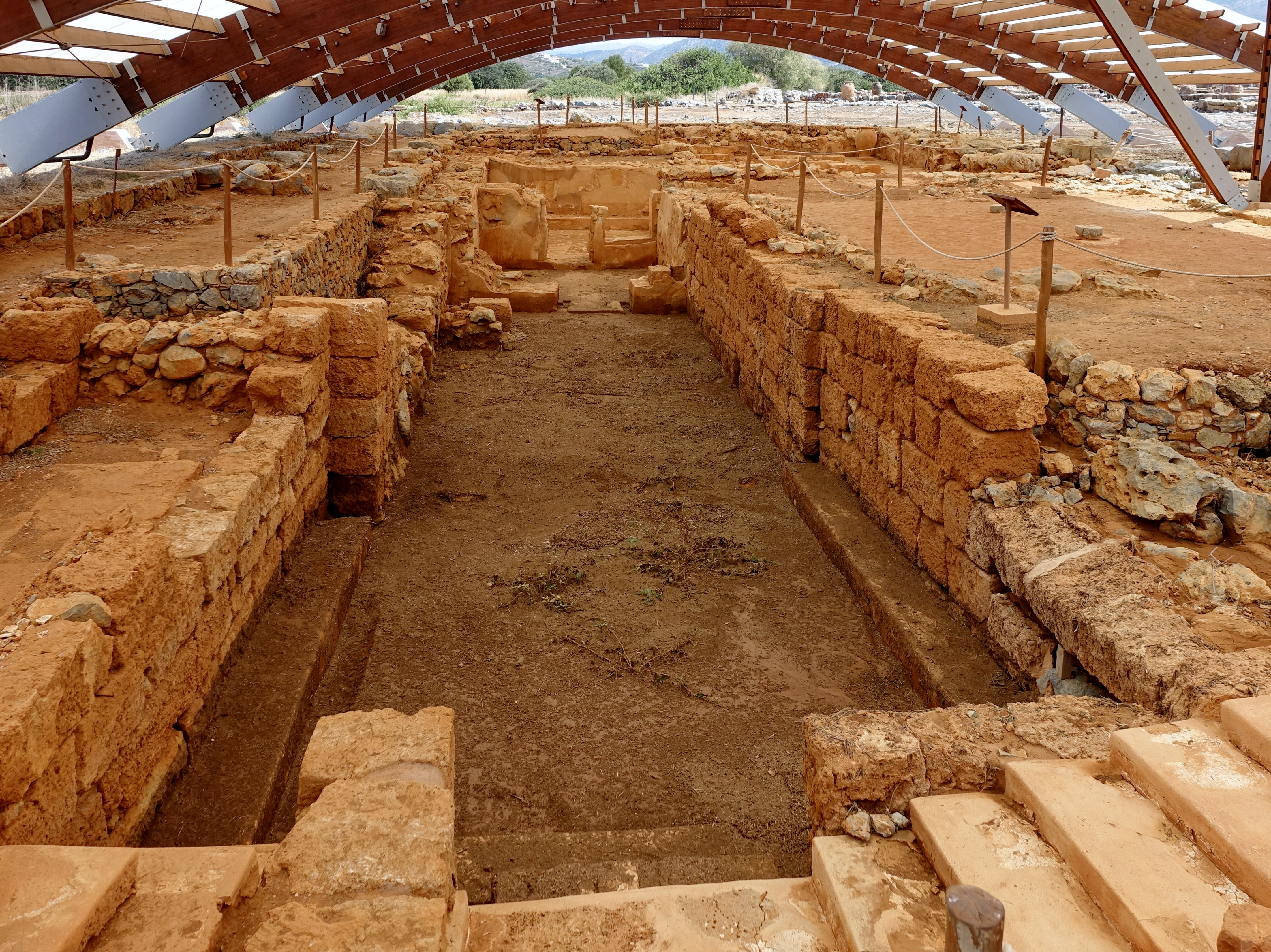 Pfeilerkrypta der Ausgrabungsstätte von Mallia (Μάλια), Gemeinde Chersonisos, Kreta, Griechenland